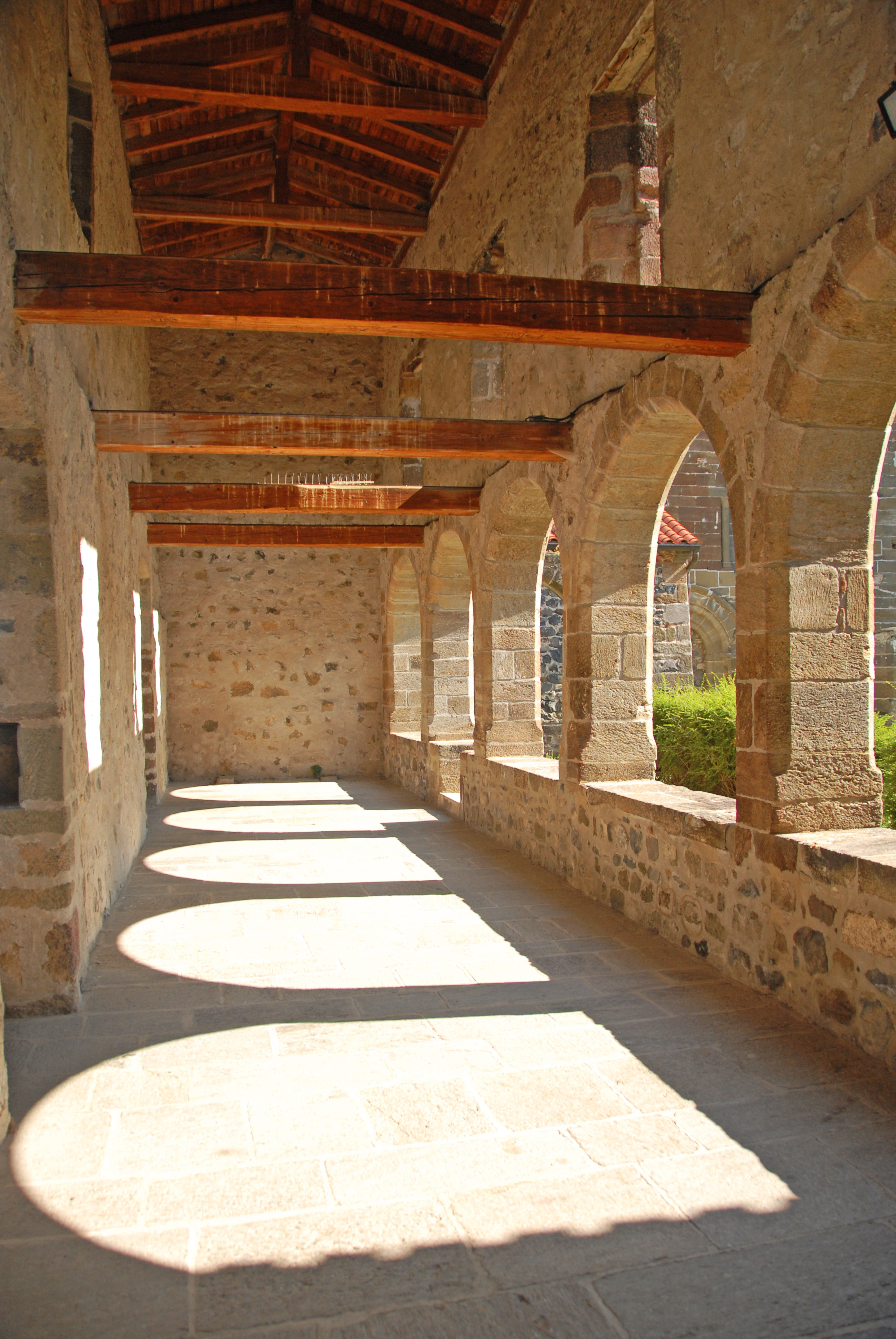 Chanteuges, Kreuzgang, Ostgalerie innen